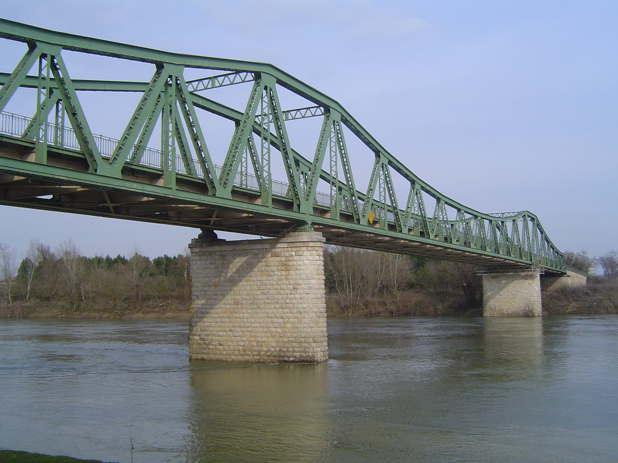 Vue sur le pont de Saint-Léger (47)